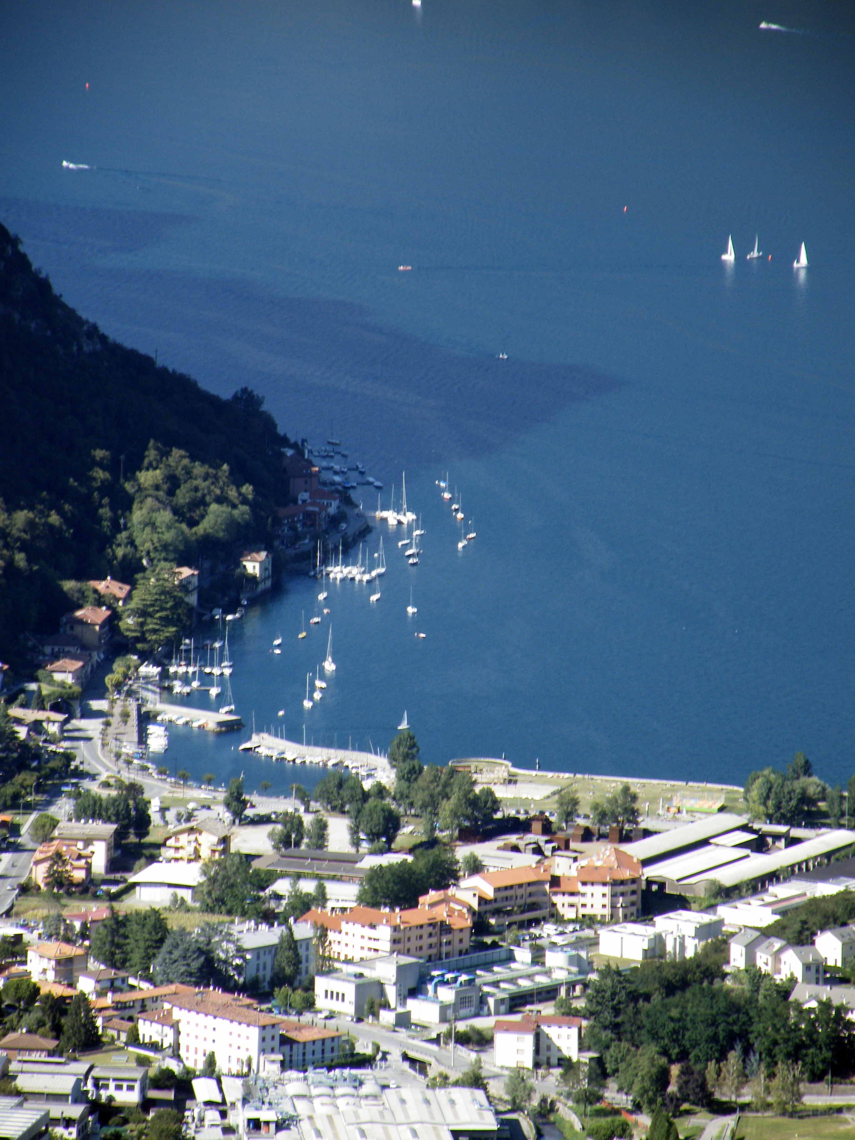 Valmadrera (fraz.Parè)